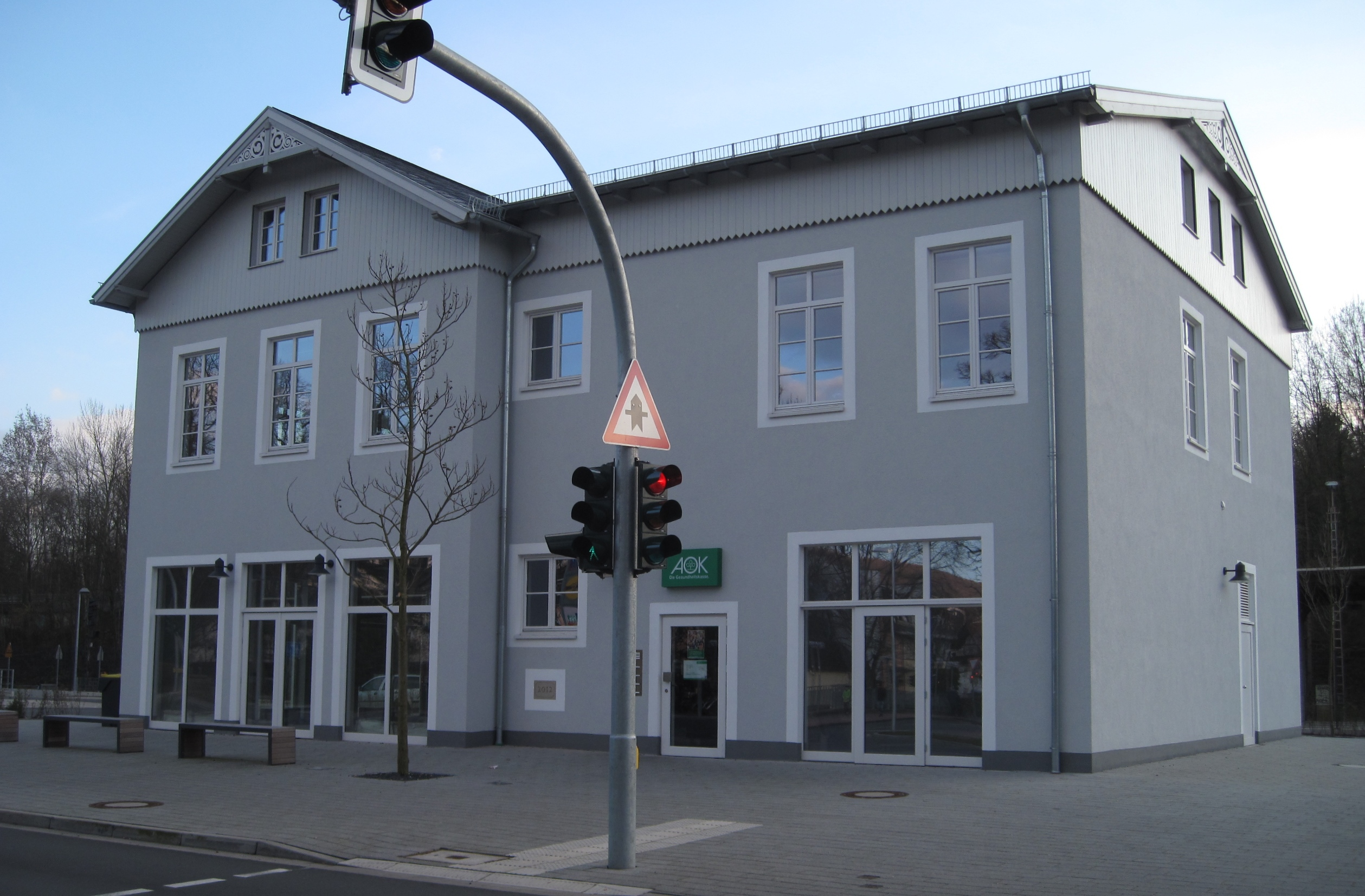 Rekonstruiertes Bahnhofsgebäude in Menden (Sauerland), Untere Promenade 4. Die Grundsteinlegung für den Neubau erfolgte am 24. August 2012. Nutzung: 1. Etage durch AOK NordWest - Geschäftsstelle Menden (Sauerland).